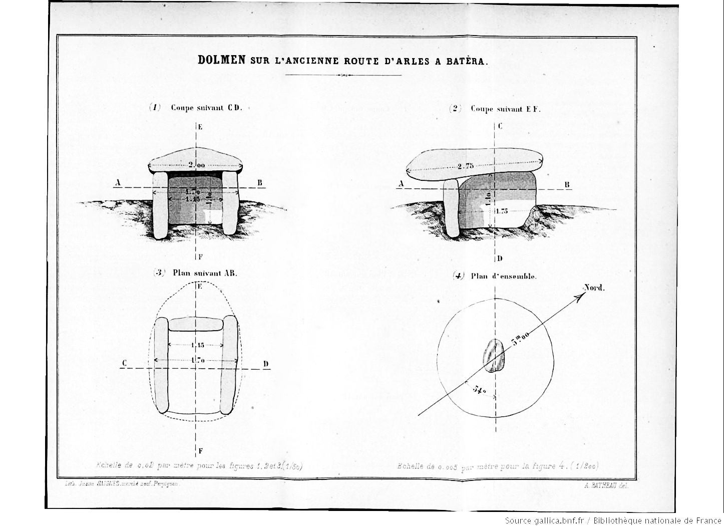 schéma du dolmen Caixa de Rotllan